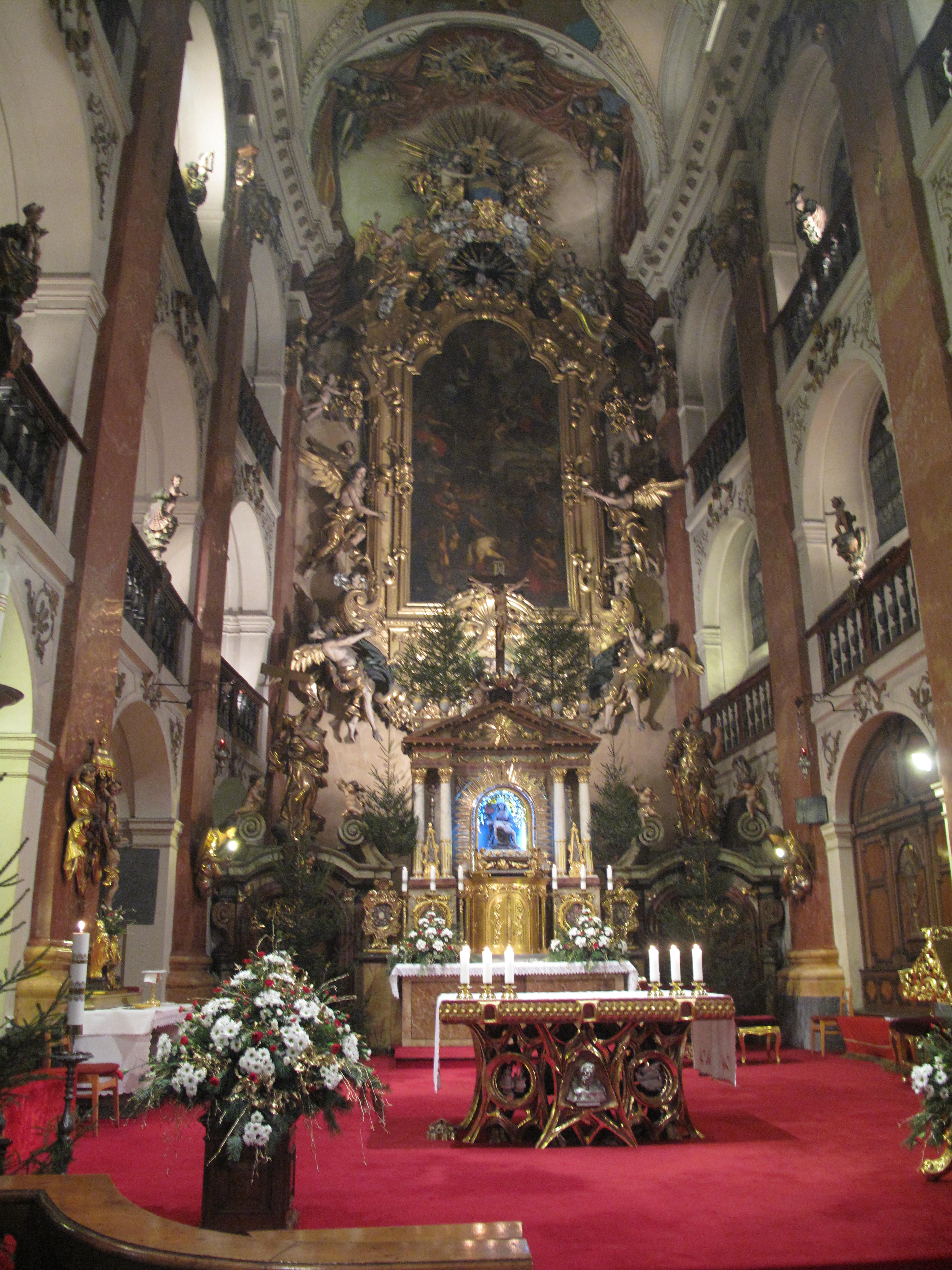 Kostel svatého Jakuba, půlnoční mše